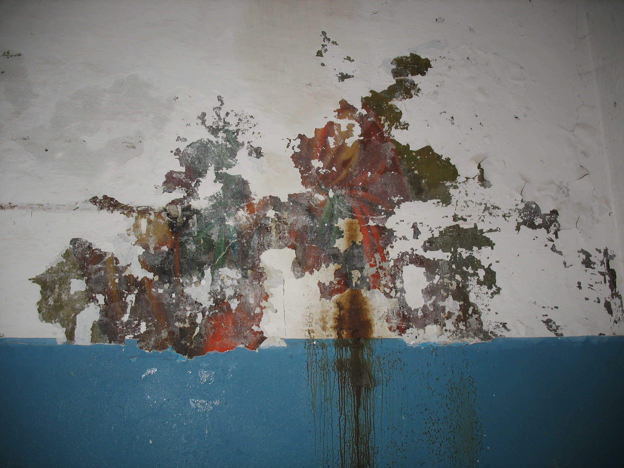 Фреска в церкви Рождества Христова на Придаче: улица Димитрова, 51, Воронеж, Воронежская область